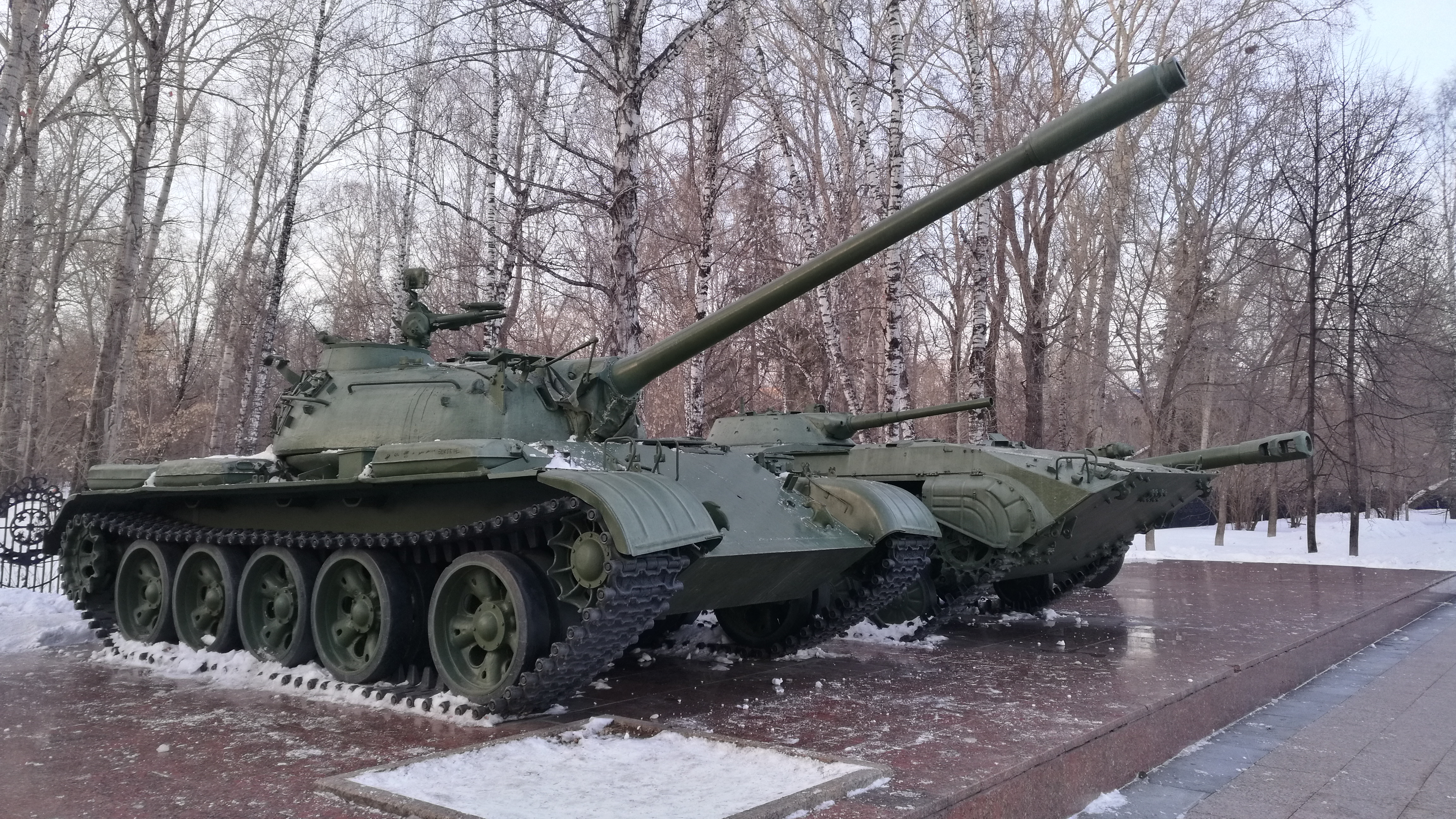 Militeknikaĵoj sur Placo de Memoro. Tjumeno, Rusio.